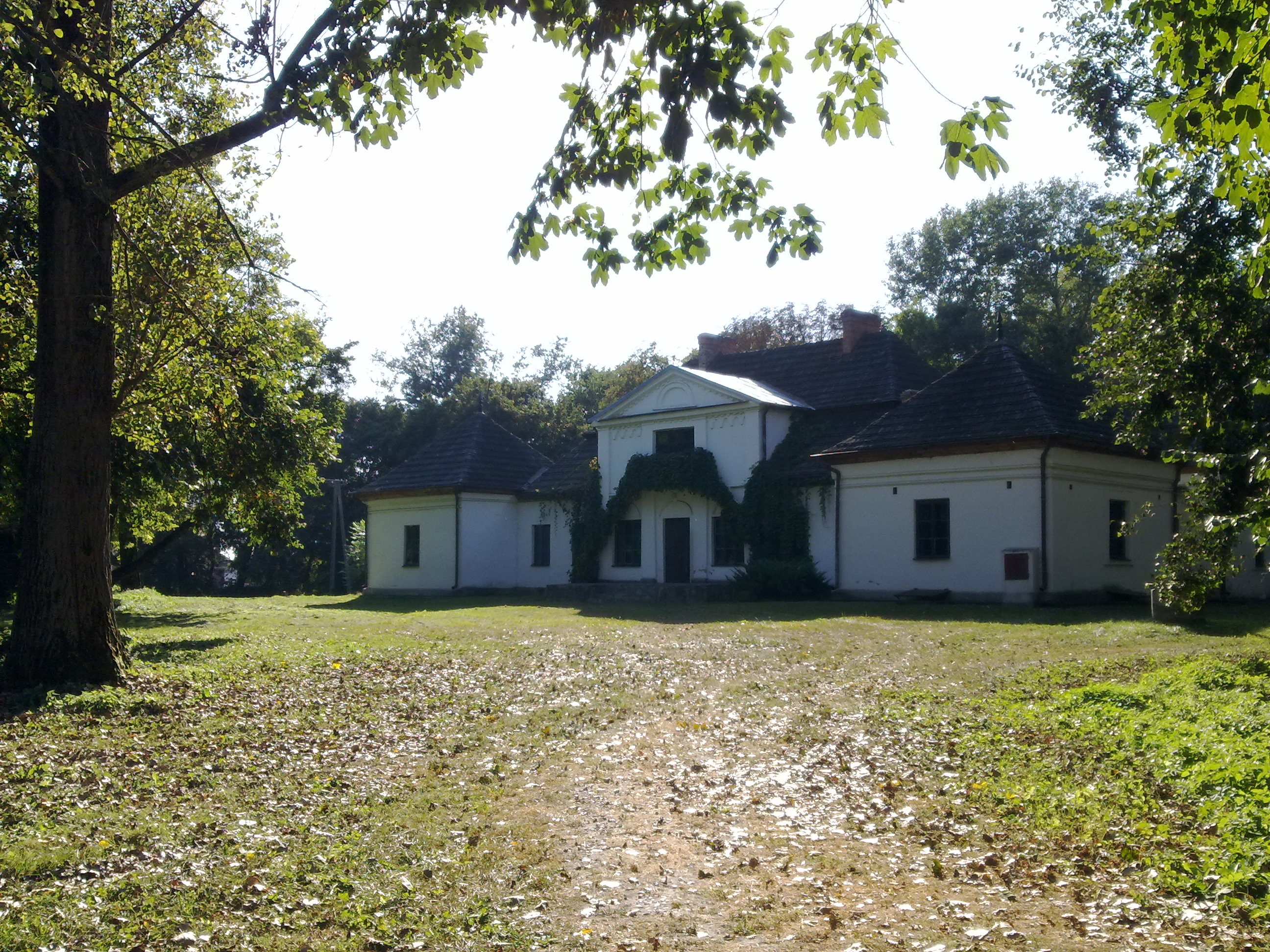 Dwór w Skotnikach w gminie Samborzec, powiat sandomierski 718/1-3.